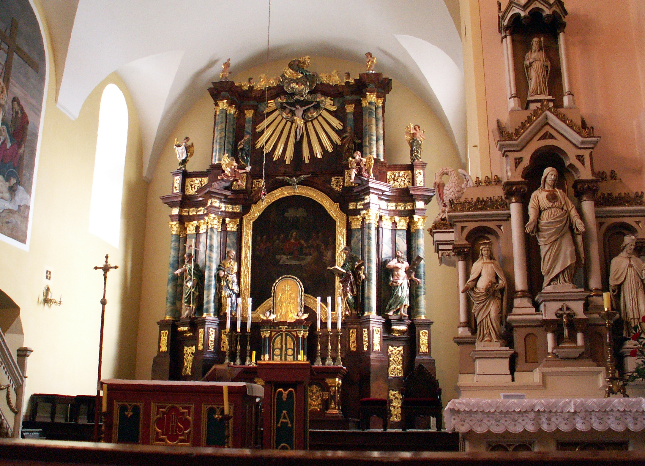 Ołtarz w kościele pw. Świętego Krzyża w Otyniu.